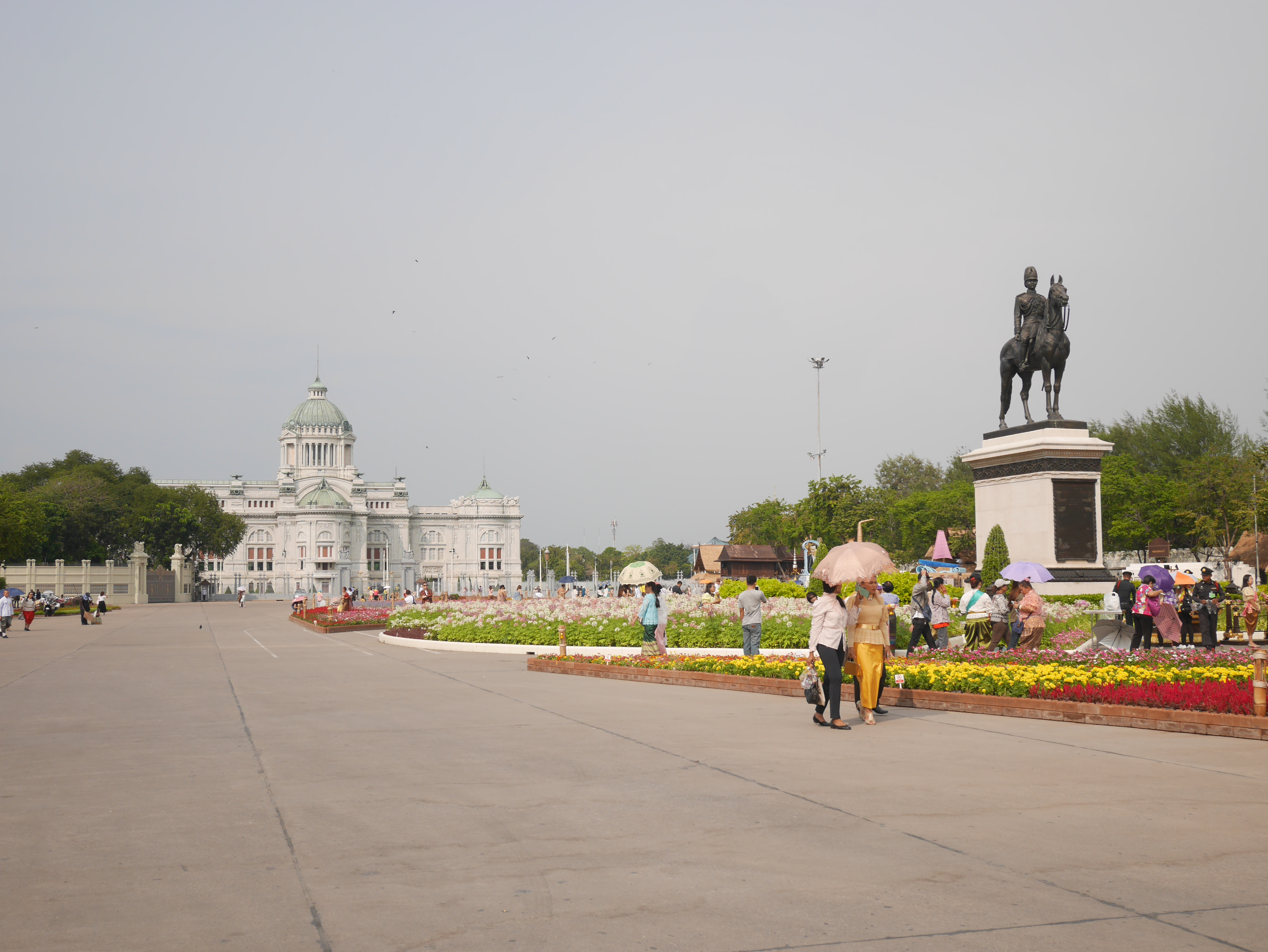 พระบรมราชานุสาวรีย์ พระบรมรูปทรงม้า